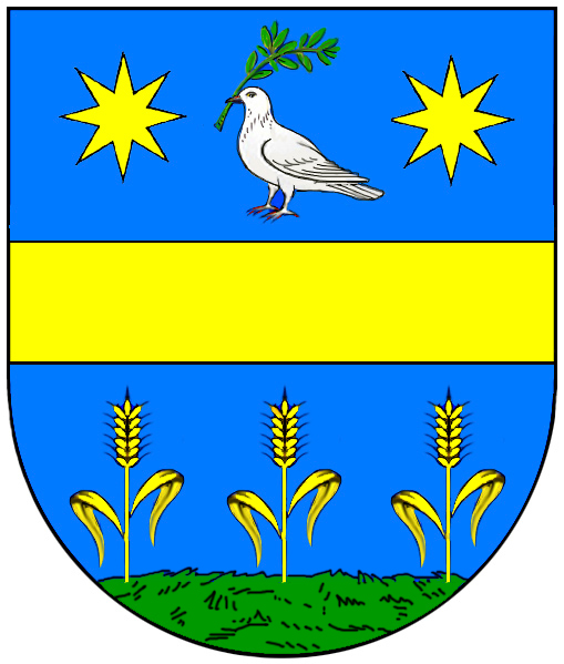 Brasão Sartori de Vicenza